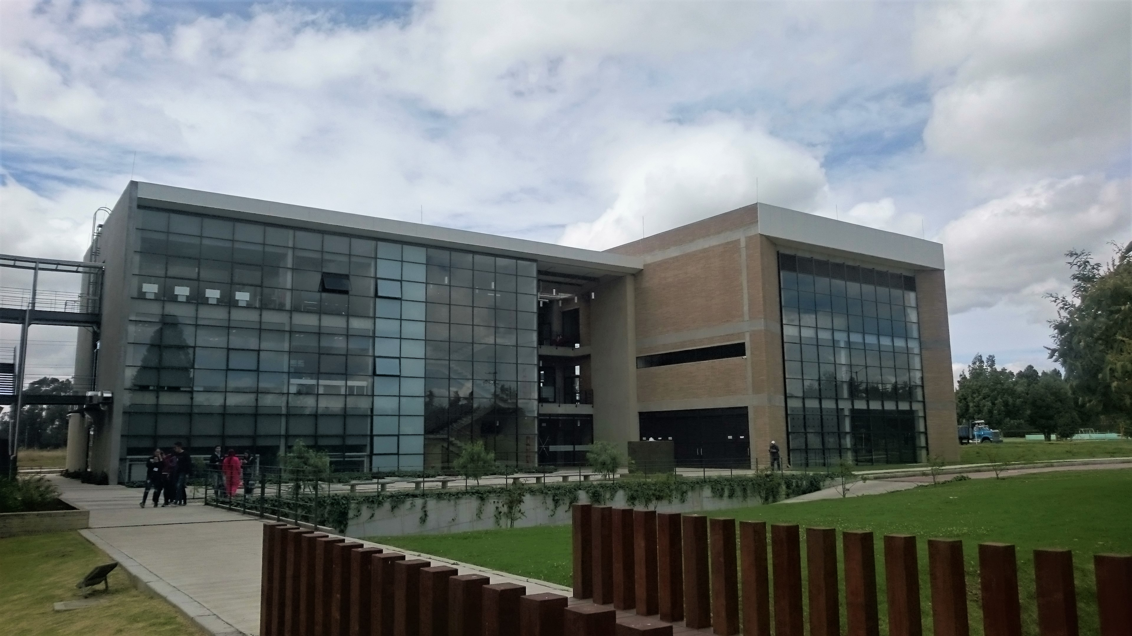 Bloque H de la Escuela Colombiana de Ingeniería